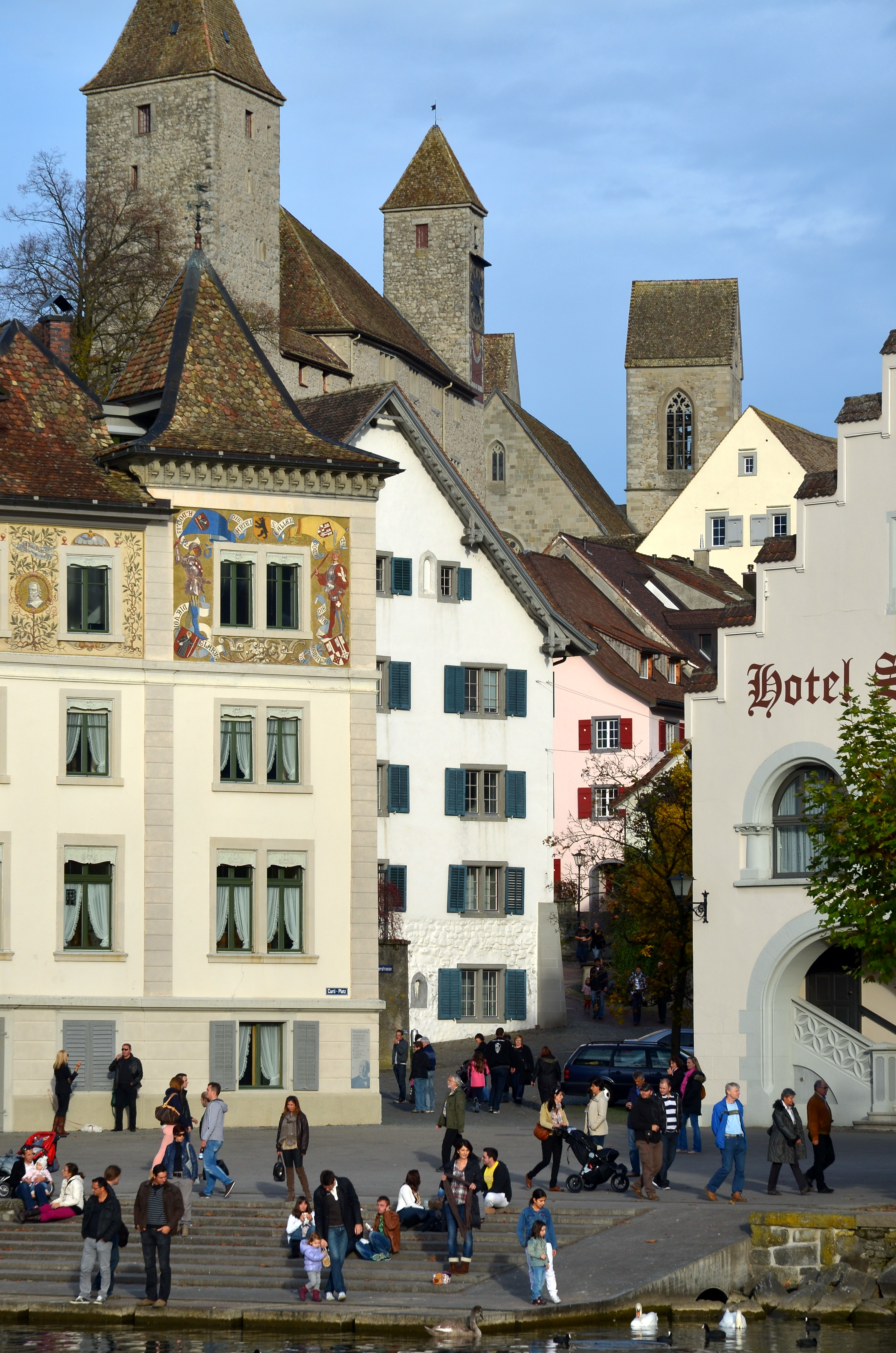 Curtiplatz and Endingerplatz in Rapperswil (Switzerland) : Curti-Haus, Haus Schlossberg, Hotel Schwanen, as seen from Zürichsee-Schiffahrtsgesellschaft (ZSG) MS Uetliberg on Zürichsee.